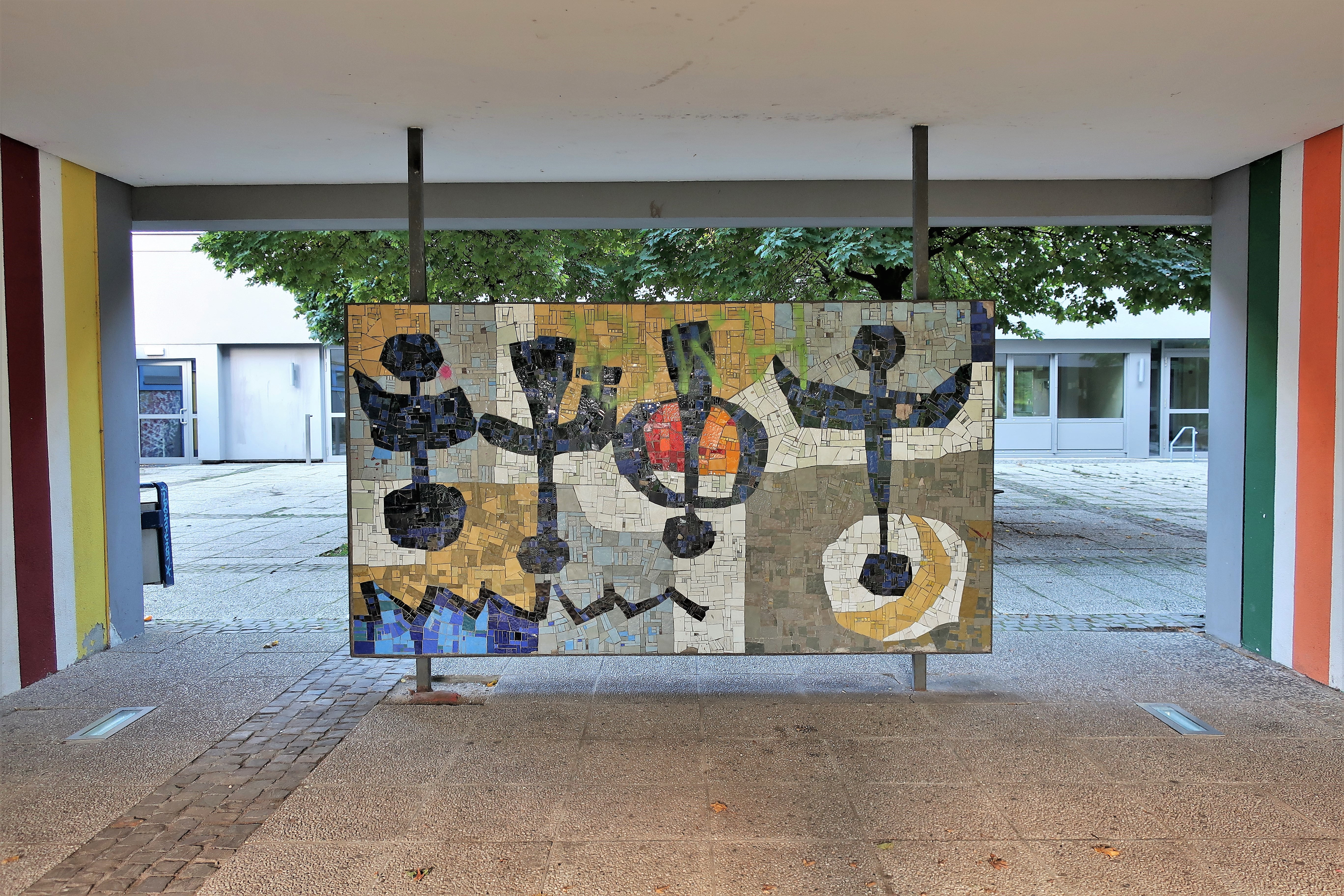 Zweiseitiges Mosaik „Prähistorische Zeichen“ (1,7 x 3,1 m) am Theodor-Heuss-Gymnasium in Hagen, Humpertstraße. Erschaffen 1965 von Erwin Hegemann. Dargestellt sind Urformen der Schrift aus der Zeit 2000 v. Chr. (Kunst im öffentlichen Raum in Hagen).